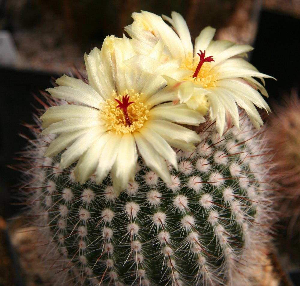 Notocactus scopa in Blüte